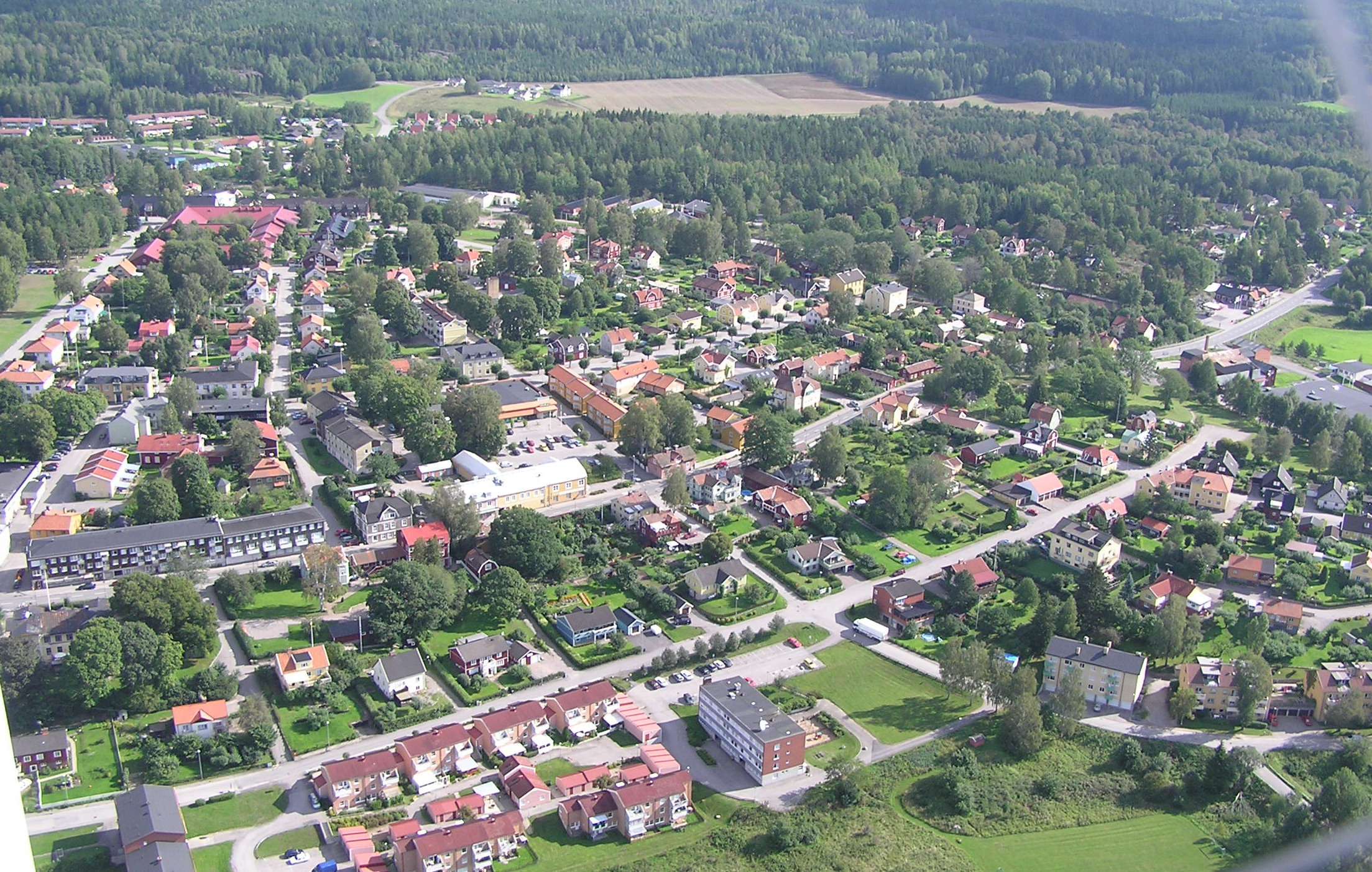 Flygfoto över Malmköping i augusti 2006